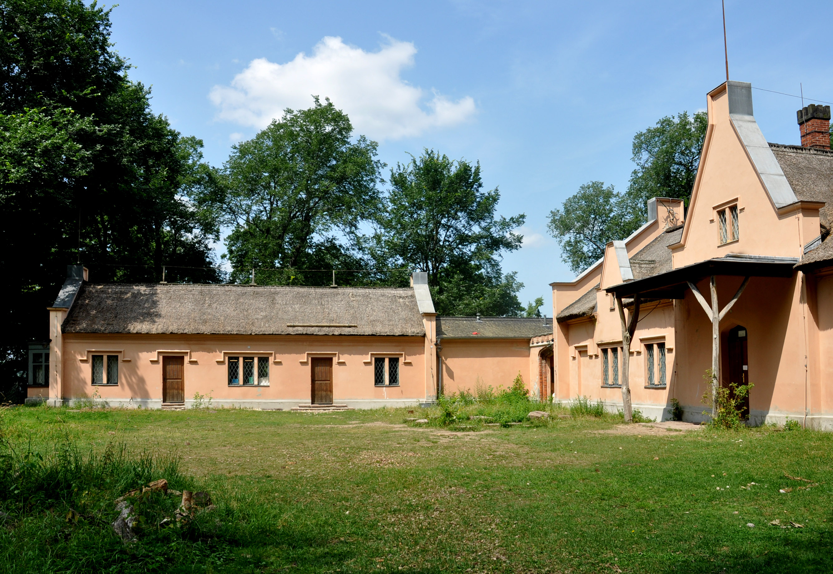 Der Hundezwinger am Jägerhof